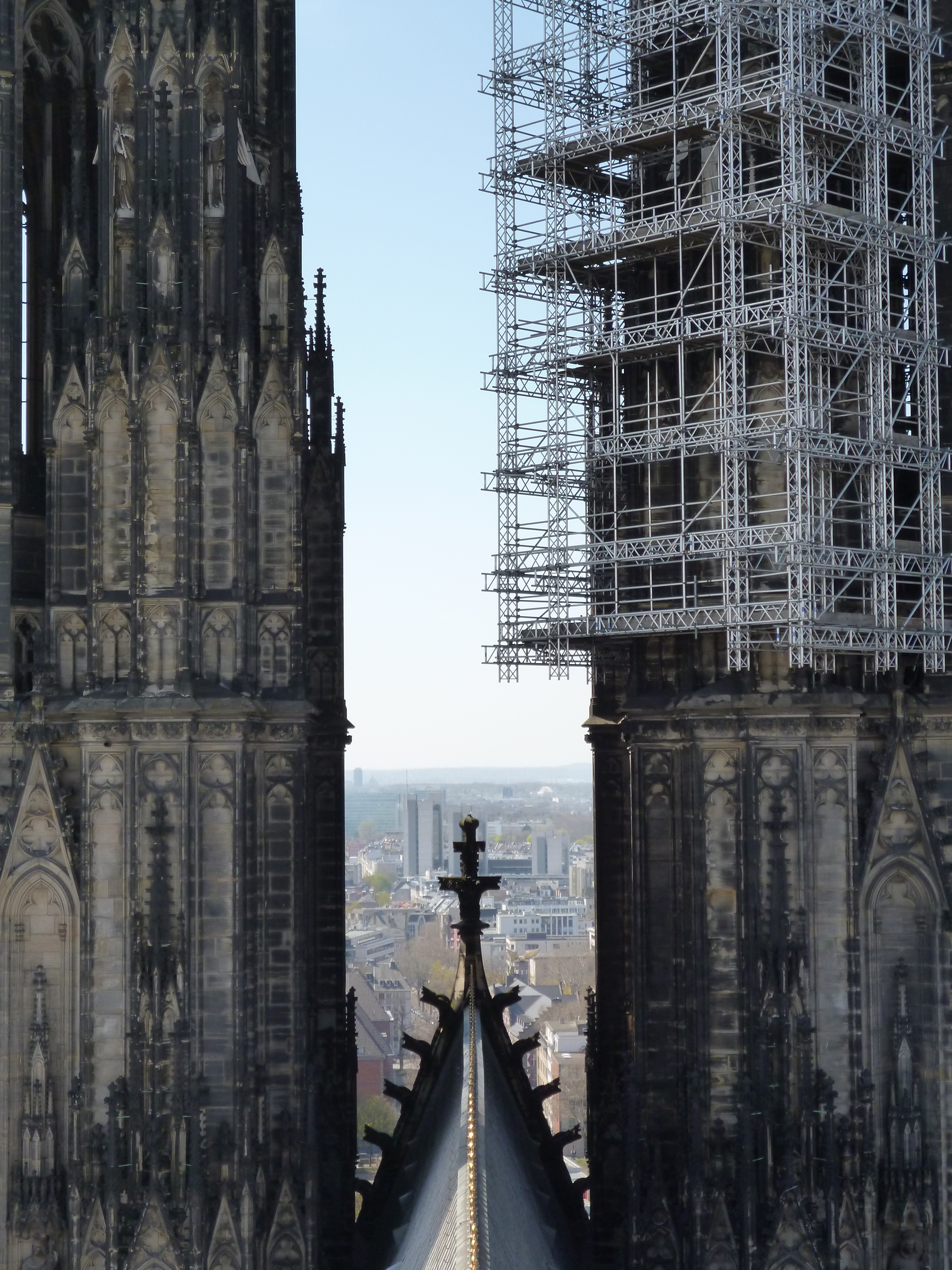 Blick vom Vierungsturm